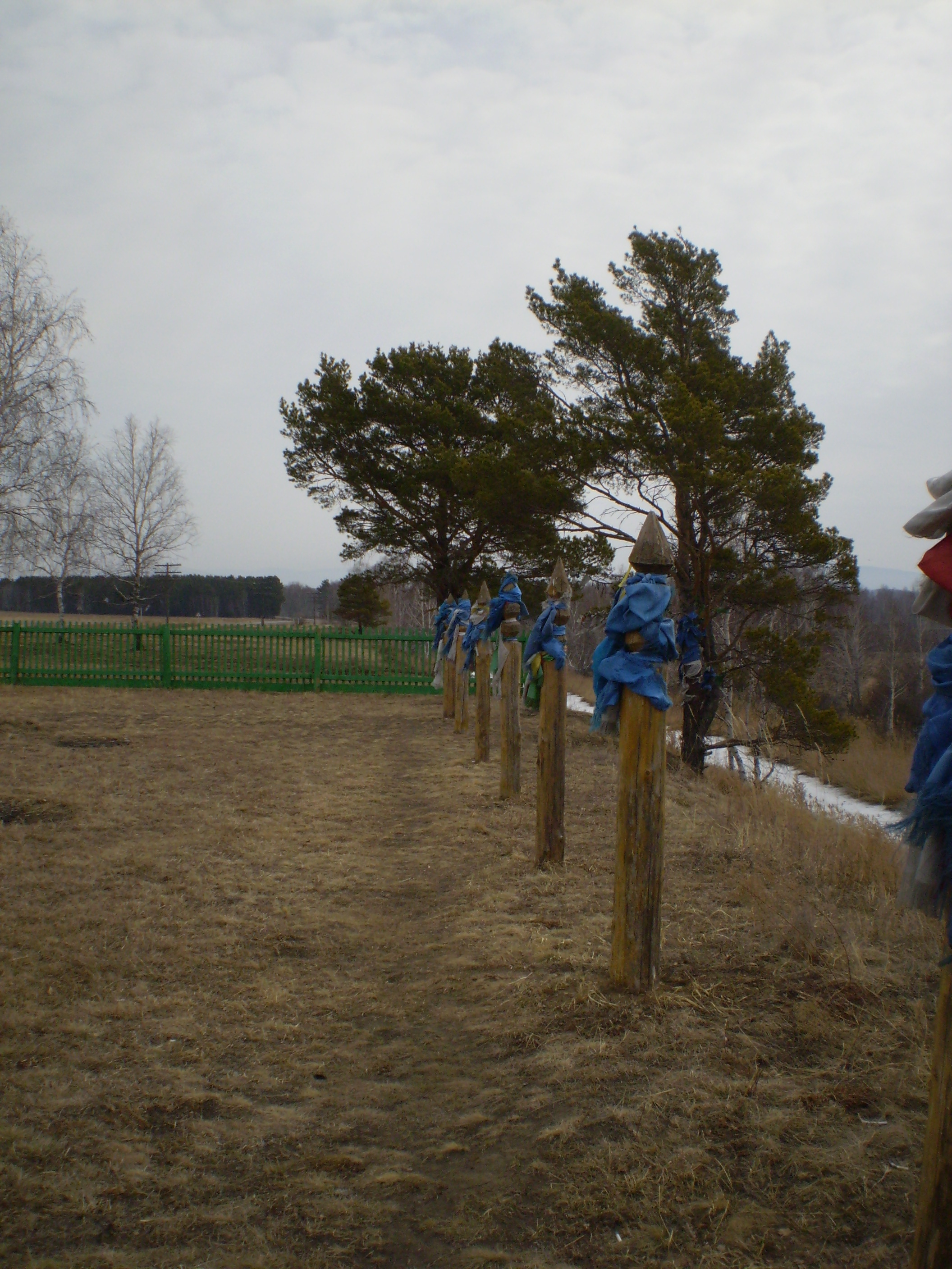 Фофановский акрополь (могильник) у села Фофаново, Кабанский район Бурятии.